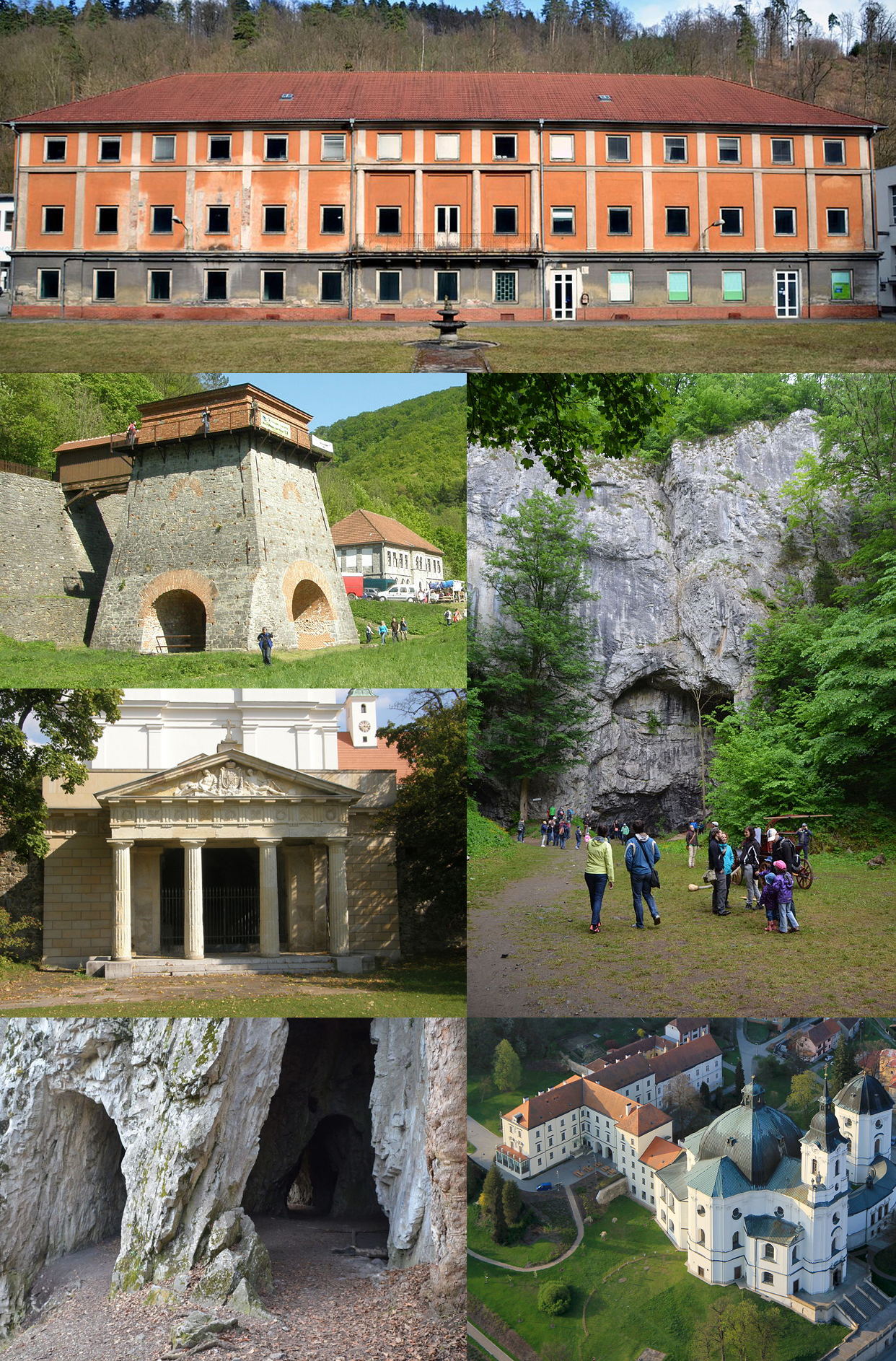 Vranovsko-křtinský lichtenštejnský areál. Na obrázcích zleva dolů: adamovský zámek, Stará huť, Býčí skála, Lichtenštejnská hrobka na Vranově, jeskyně Kostelík, Kostel Jména Panny Marie ve Křtinách